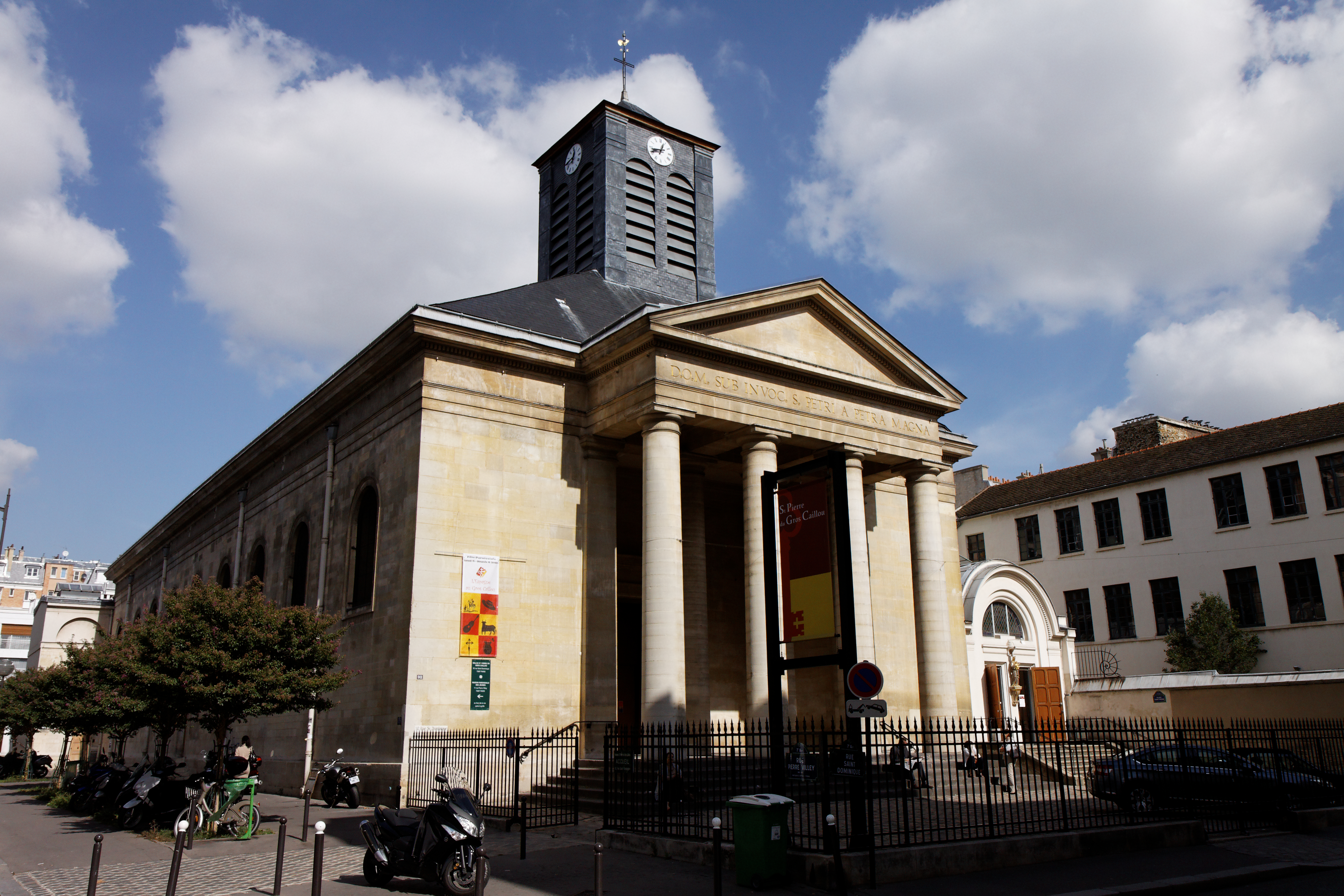 L'église Saint-Pierre-du-Gros-Caillou dans le 7ème arrondissement de Paris. .